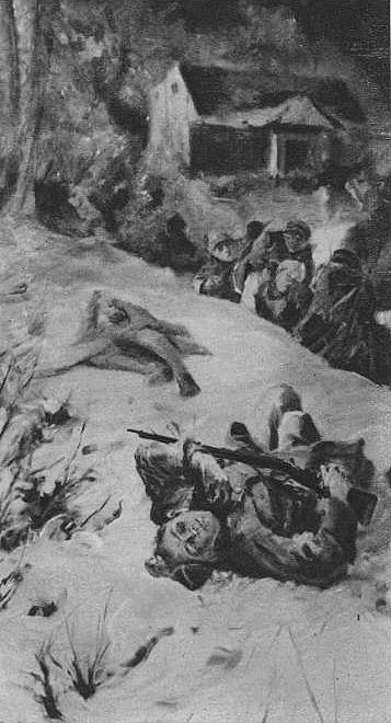 Zgon por. Iwo Skałkowskiego w obronie Persenkówki 28 grudnia 1918. Obraz Stanisława Batowskiego.